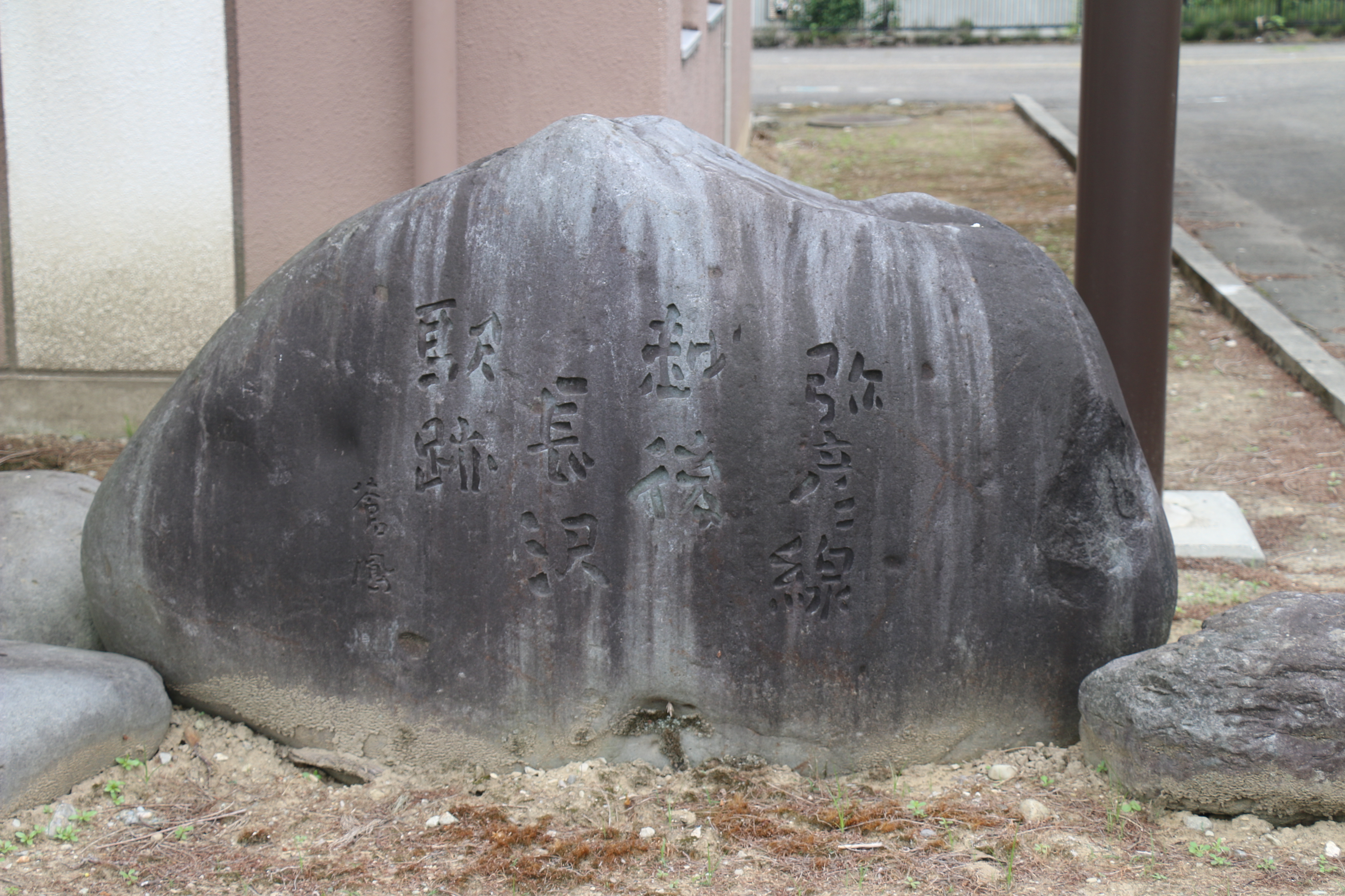 越後長澤駅跡 石碑